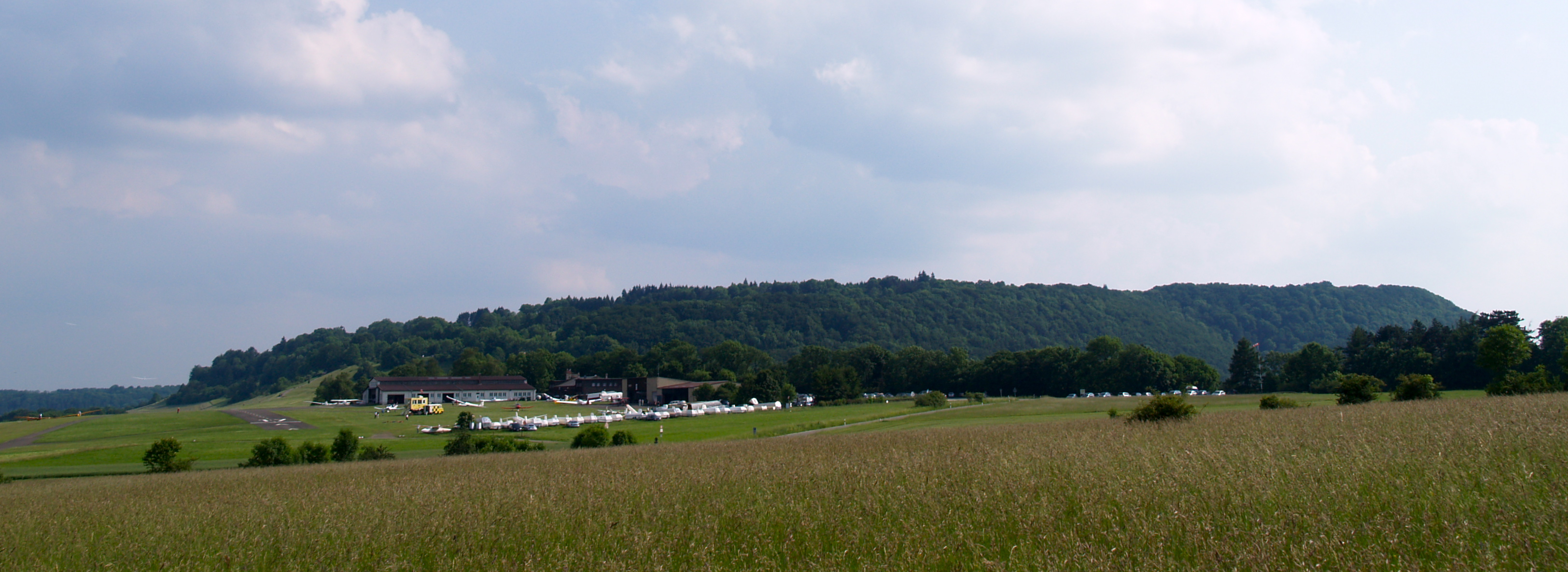 Ausgeschnittene und leicht farbraumoptimierte Variante von File:Kaltes Feld vom Hornberg.jpg